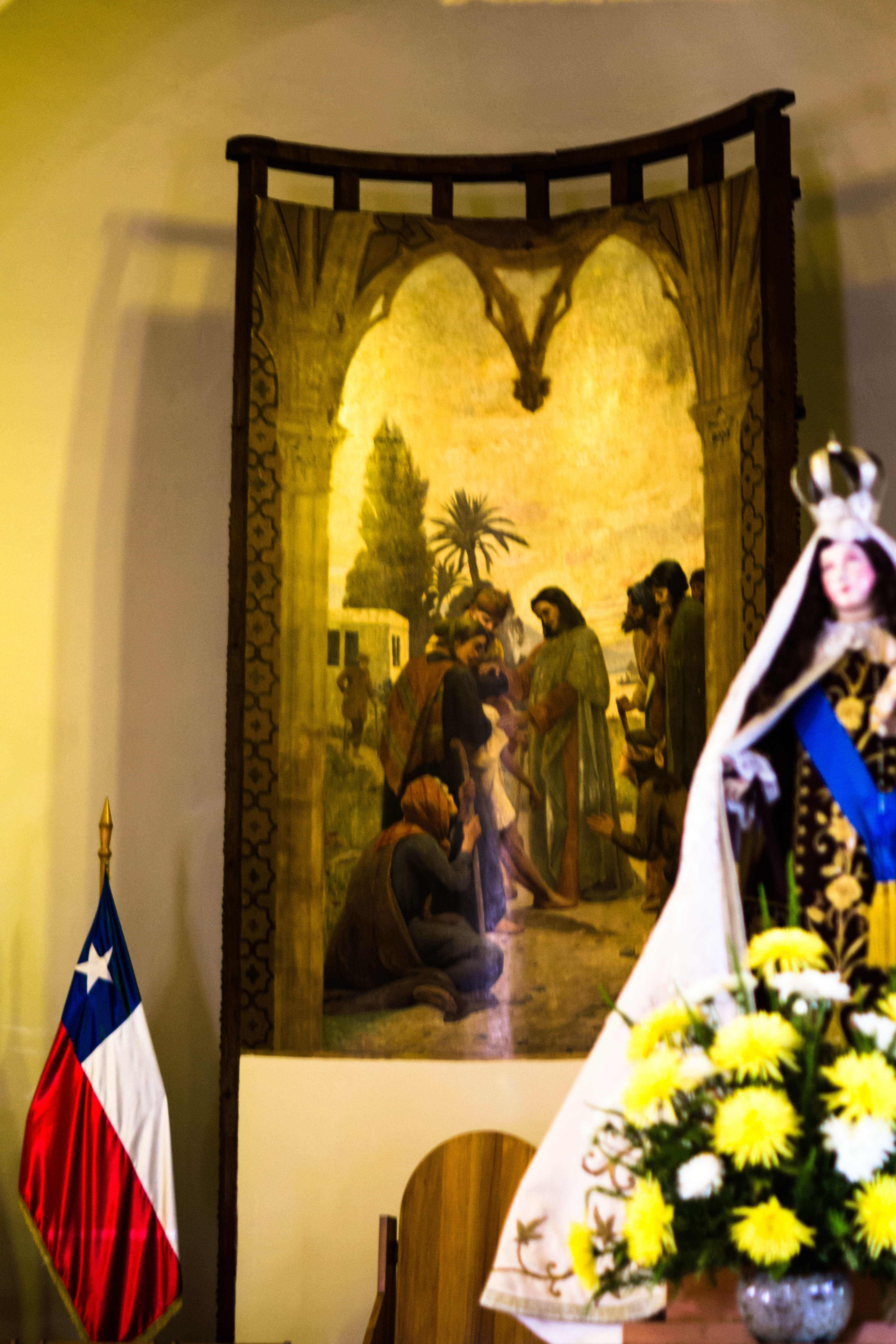 Mural de Pedro Lira This is a photo of a national monument in Chile: 236